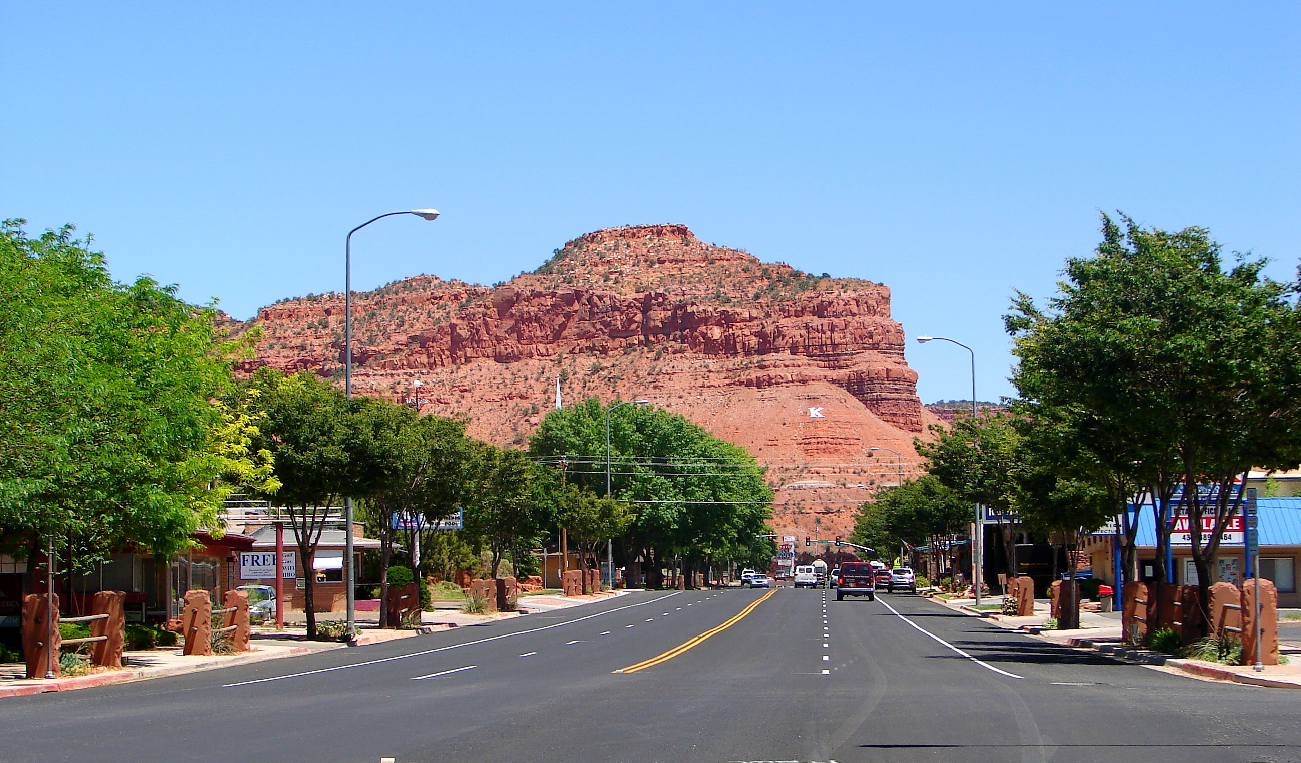 Kanab, Utah, United States